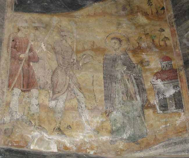 Стенопись из купола церкви в монастыре “Св. Наум” у Охридского озера. На реставрированном изображении богомилы пытаются прогнать святого Наума, пришедшего к ним проповедовать новый вариант христианства. В традиционной версии истории богомильство “возникает” спустя полвека после смерти св. Наума.